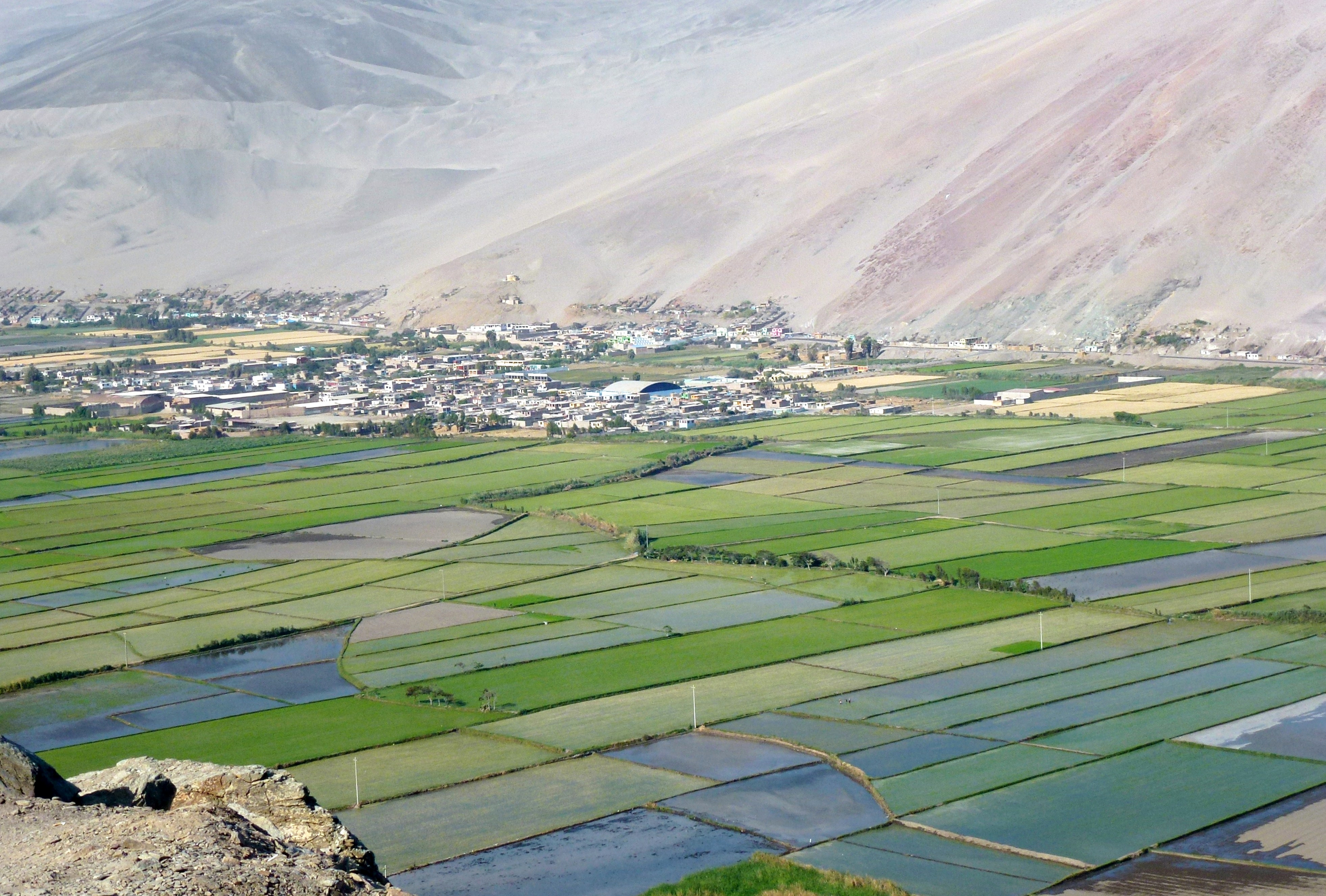 Ocoña, vu de la Route panaméricaine Sur.- Distrit deOcaña dans la province de Lucanas.- Pérou.